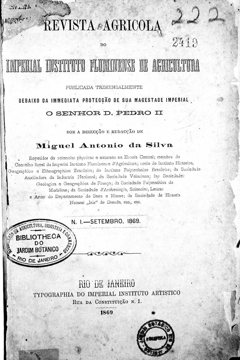 Primeira página da Revista Agrícola do Imperial Instituto